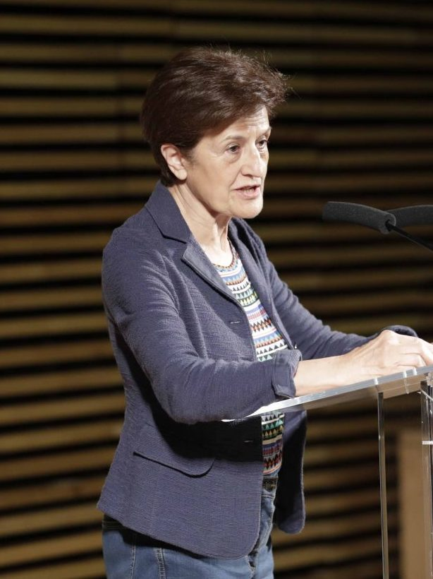 Un compromiso y una vocación únicos: salvar vidas. Aceptar la discrepancia, sabiendo que un problema tan complejo como la migración y el refugio no puede concitar unanimidades, pero no dejando que la controversia sea un elemento que lo enquiste. Así podría resumirse el mensaje que la alcaldesa de Madrid, Manuela Carmena, ha lanzado esta mañana durante la conferencia Los Pactos Mundiales sobre Migrantes y Refugiados 2018: Pactos que salvan vidas, en la que también han participado el cardenal arzobispo de Madrid, Carlos Osoro; el presidente de la Comunidad de Madrid, Ángel Garrido, y la filósofa Adela Cortina. “Sepamos aceptar la discrepancia porque cuando las problemáticas son tan difíciles, la unanimidad no es lo mejor”, ha subrayado Carmena al tiempo que añadía: “Aceptemos que todos queremos acabar con esto, pero no todos tenemos la misma visión. Seamos capaces de hablar, de hacer programas para hacer realidad esos objetivos de acogida, sabiendo que tenemos que encontrar unos términos en los que la controversia no sea áspera ni provoque enfrentamientos, que no nos convierta en bloques ante un problema que lo que hay que hacer es solucionarlo”.